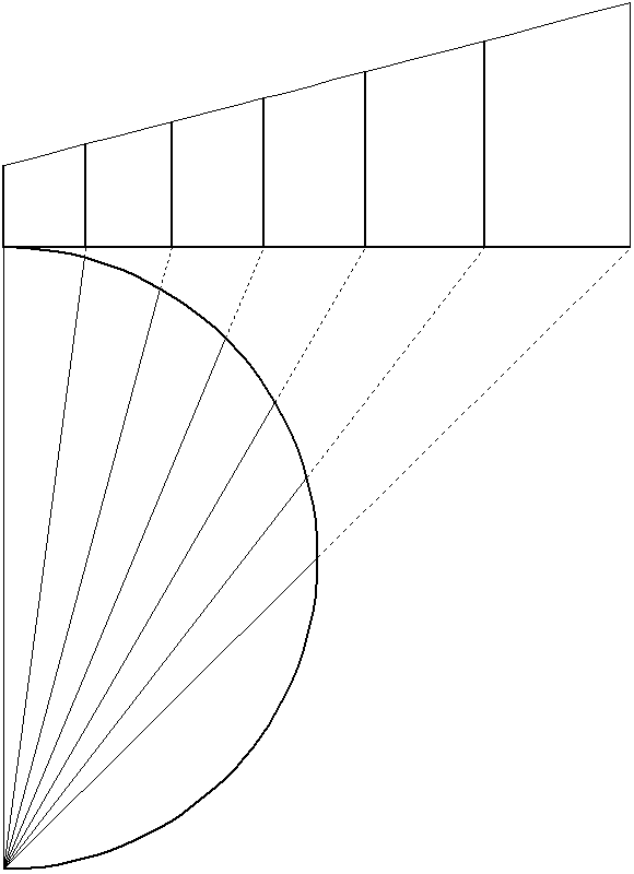 Vergrotende breedte polaire azimutale projectie